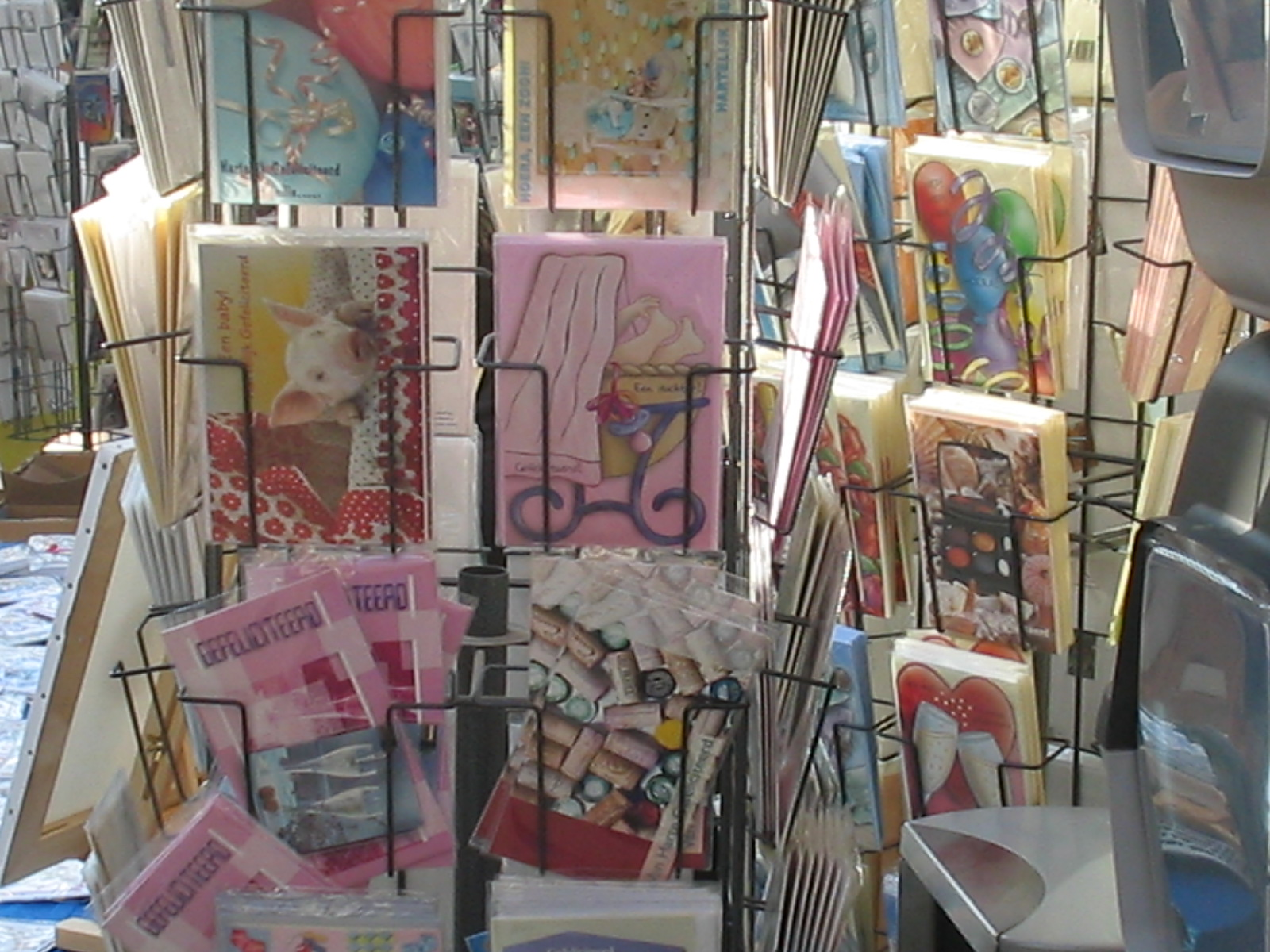 wenskaartenstandaard